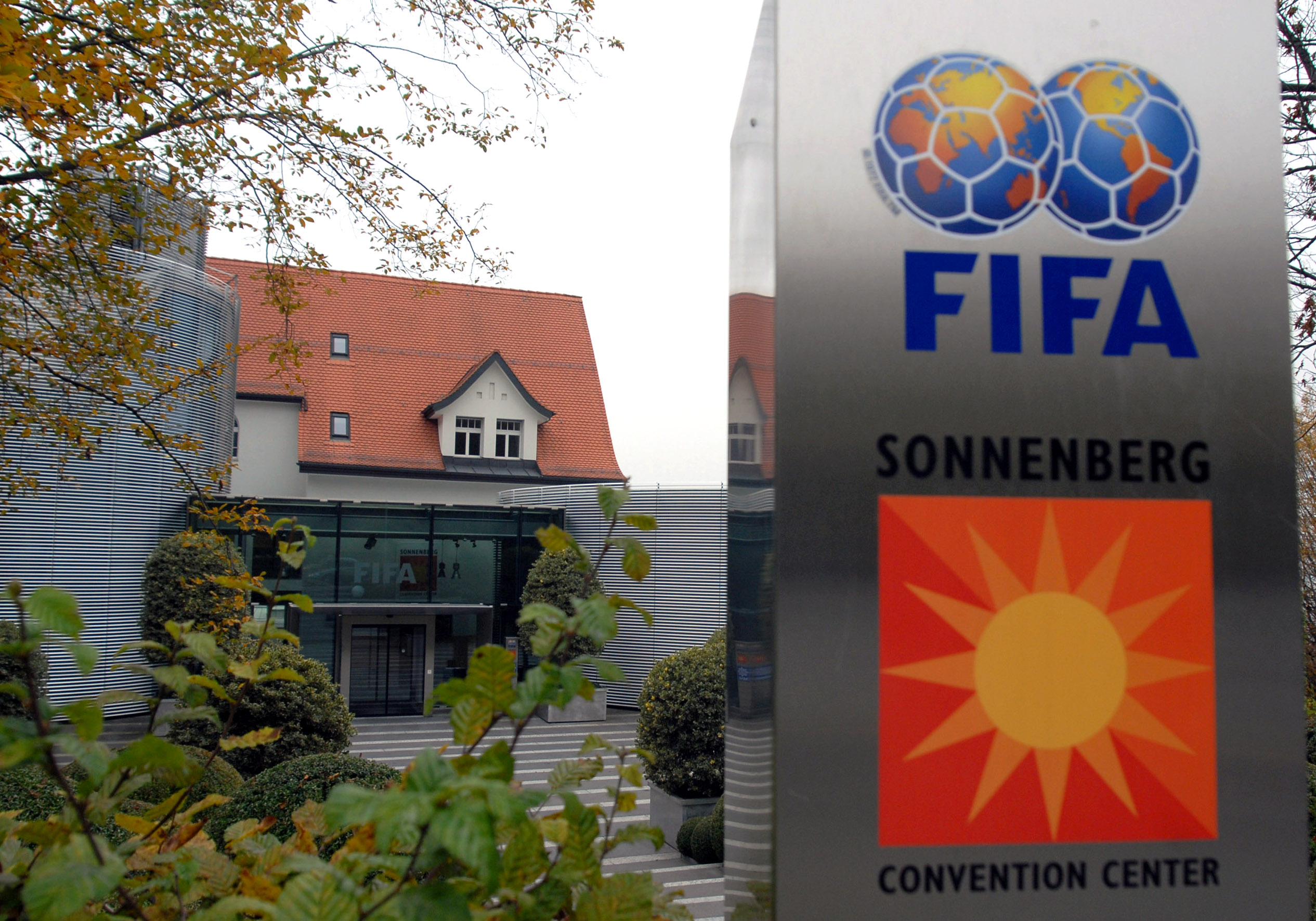 FIFA Sonnenberg Convention Center